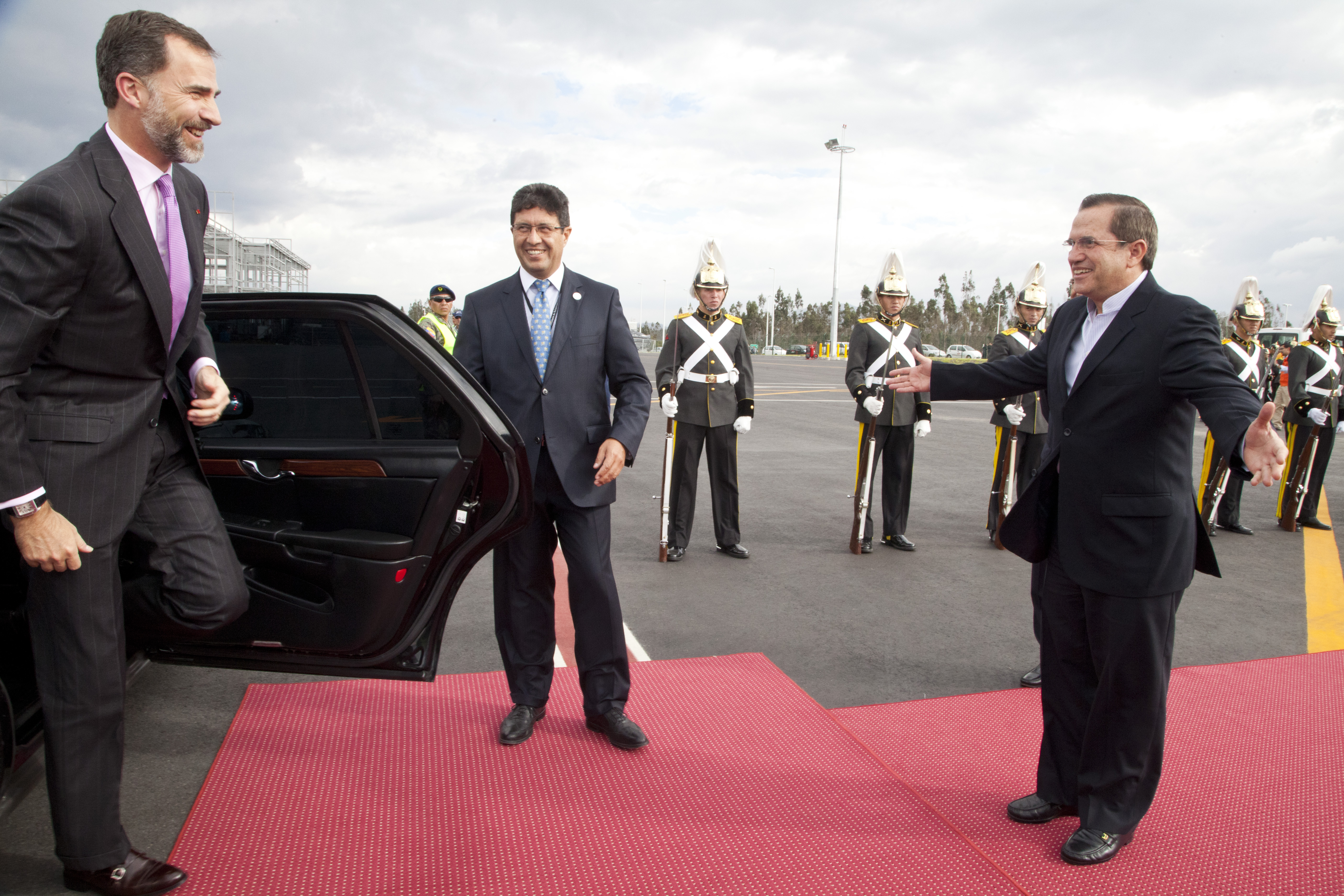 Quito (Ecuador), 23 de mayo 2013. Esta tarde en el aeropuerto Mariscal Sucre, el Canciller Ricardo Patiño recibió al Príncipe de Asturias, Felipe de Borbón. Foto: Fernanda LeMarie - Cancillería del Ecuador.